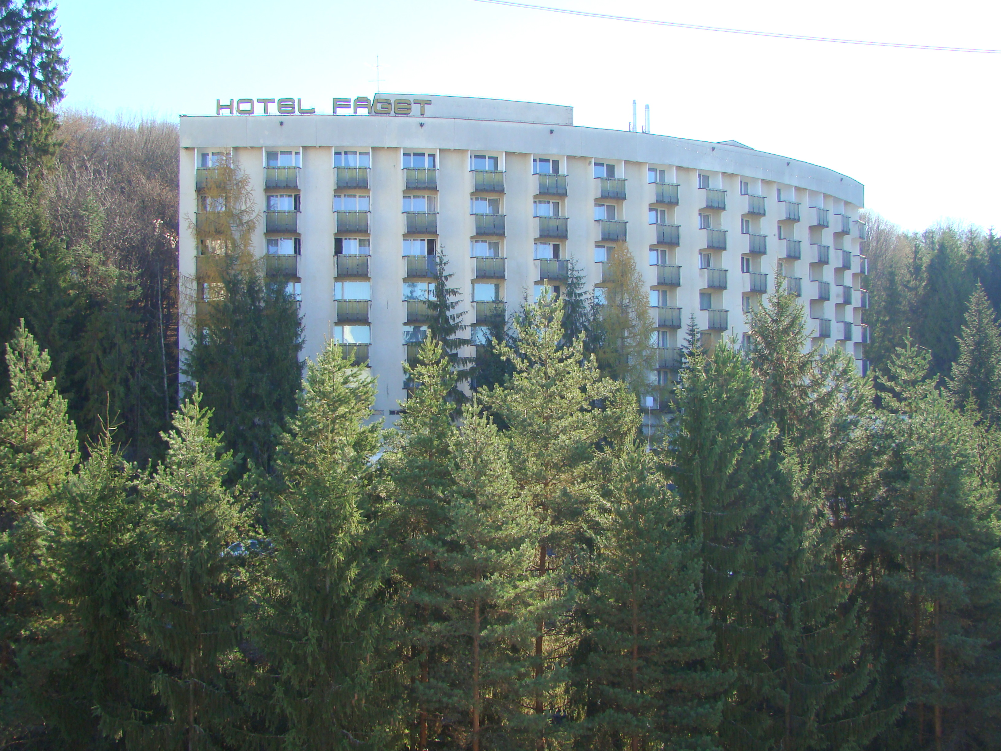 Hotel Făget din Sovata